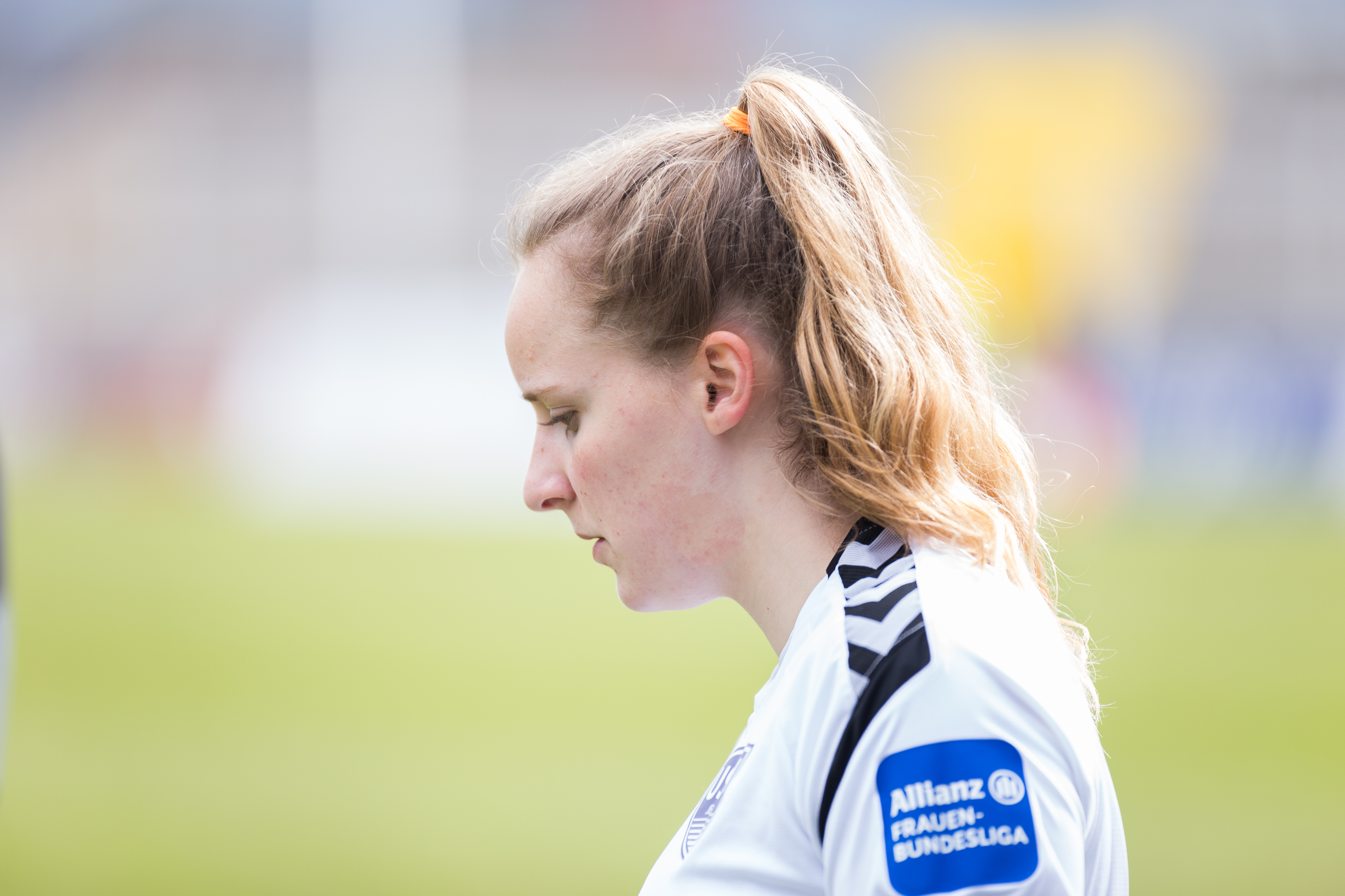 Anna-Lena Riedel (FF USV Jena, 15); Porträt, Einzelbild